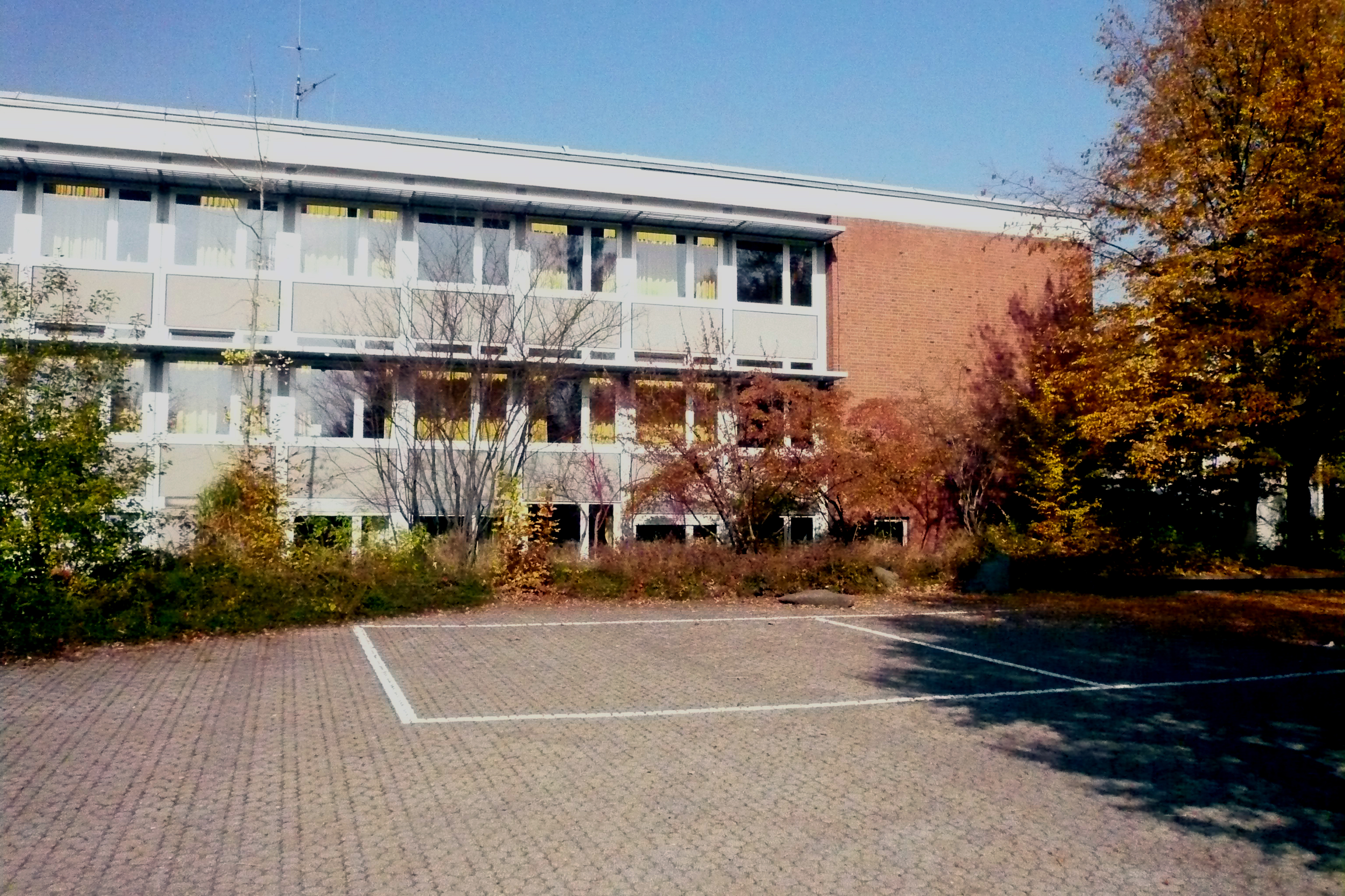 Aula